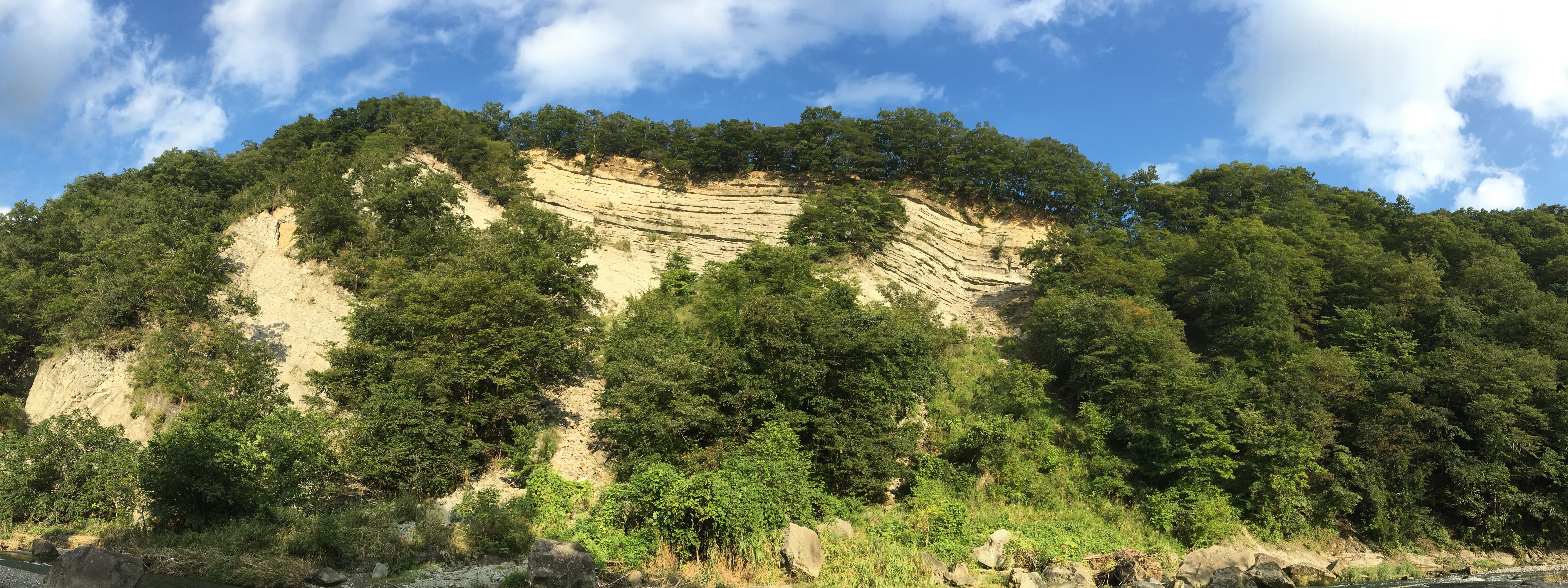 おがの化石館付近にある露頭「ようばけ」のパノラマ写真